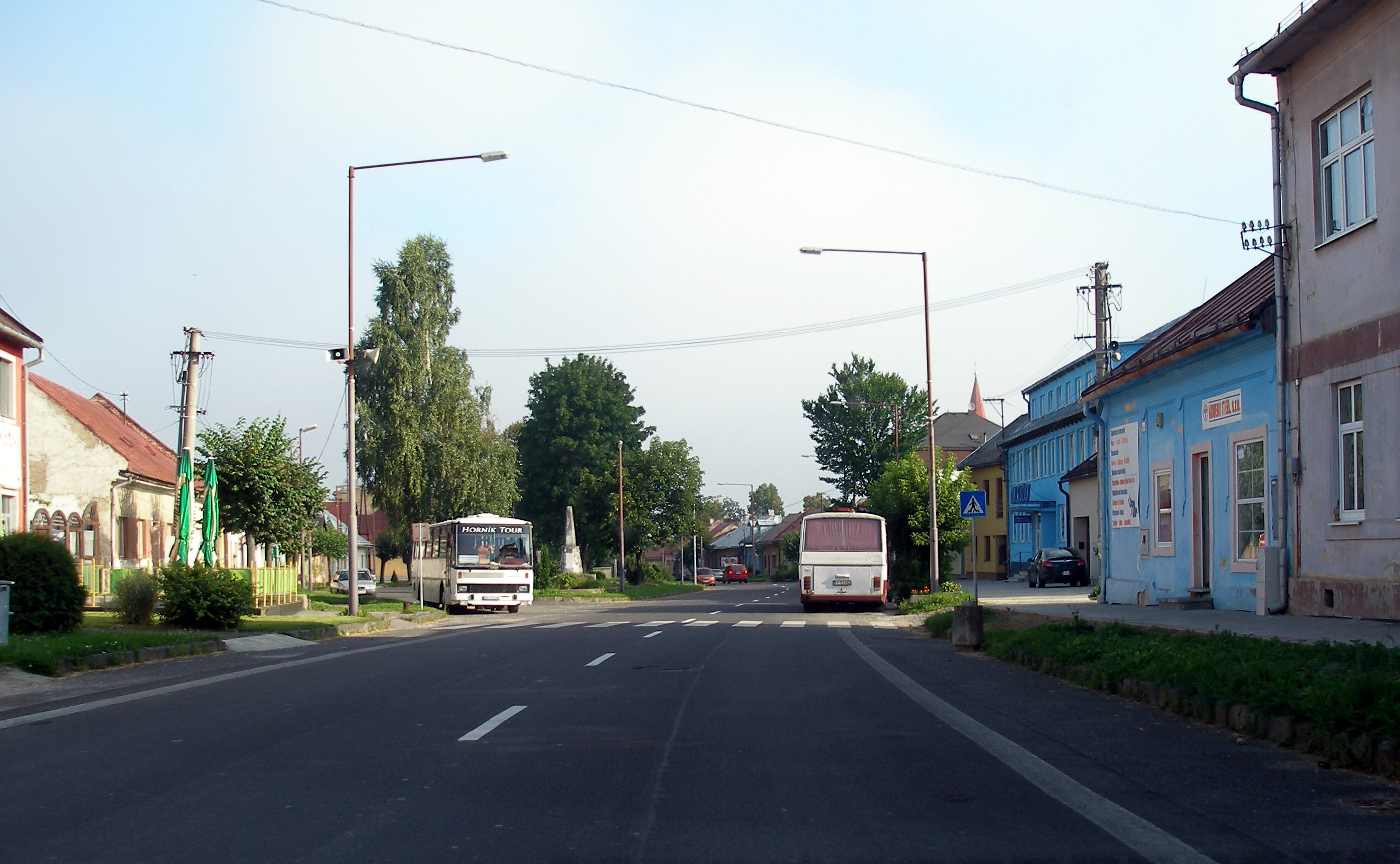 Obec Spišská Stará Ves.